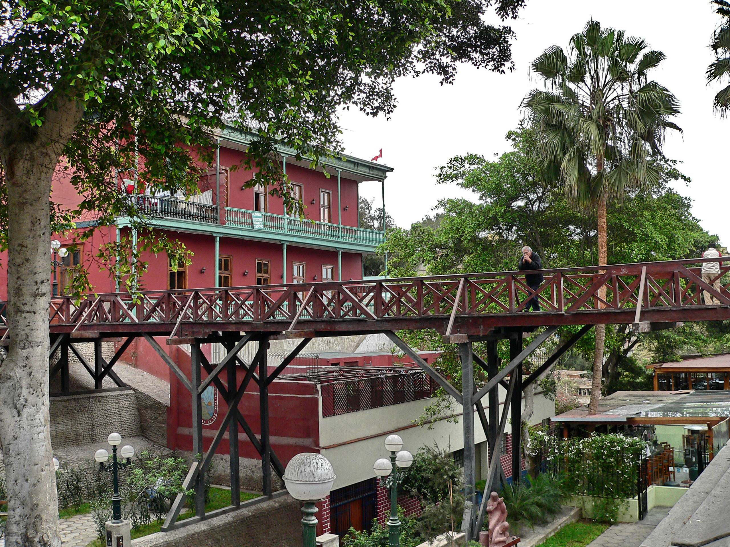 Puente de los Suspiros en Barranco, Lima Descripción: Puente de los Suspiros Lugar: Distrito de Barranco Ciudad : Lima Fotógrafo: © Manuel González Olaechea y Franco Fecha de la foto : 12 de julio de 2007